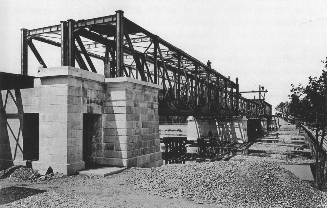 Die Braunauer Eisenbahnbrücke in München, kurz vor der Fertigstellung